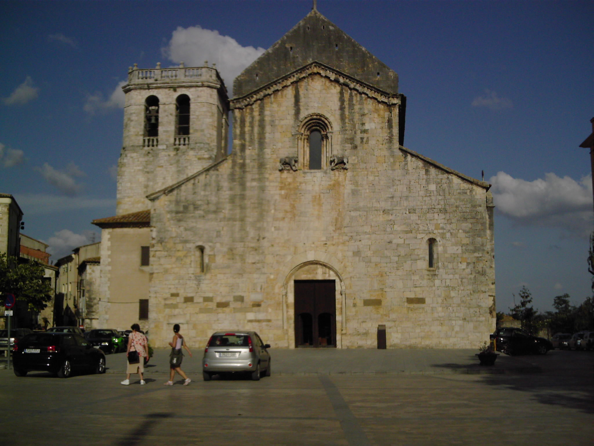 església st Pere de Besalú